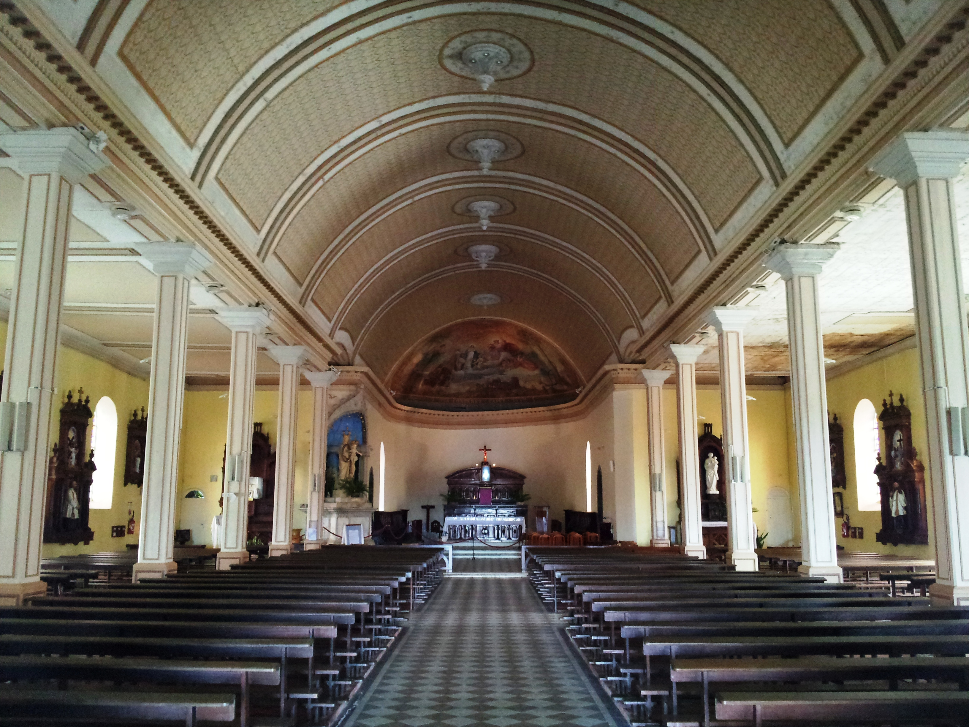 Intérieur de l'église Notre-Dame de la Délivrande du Morne-Rouge